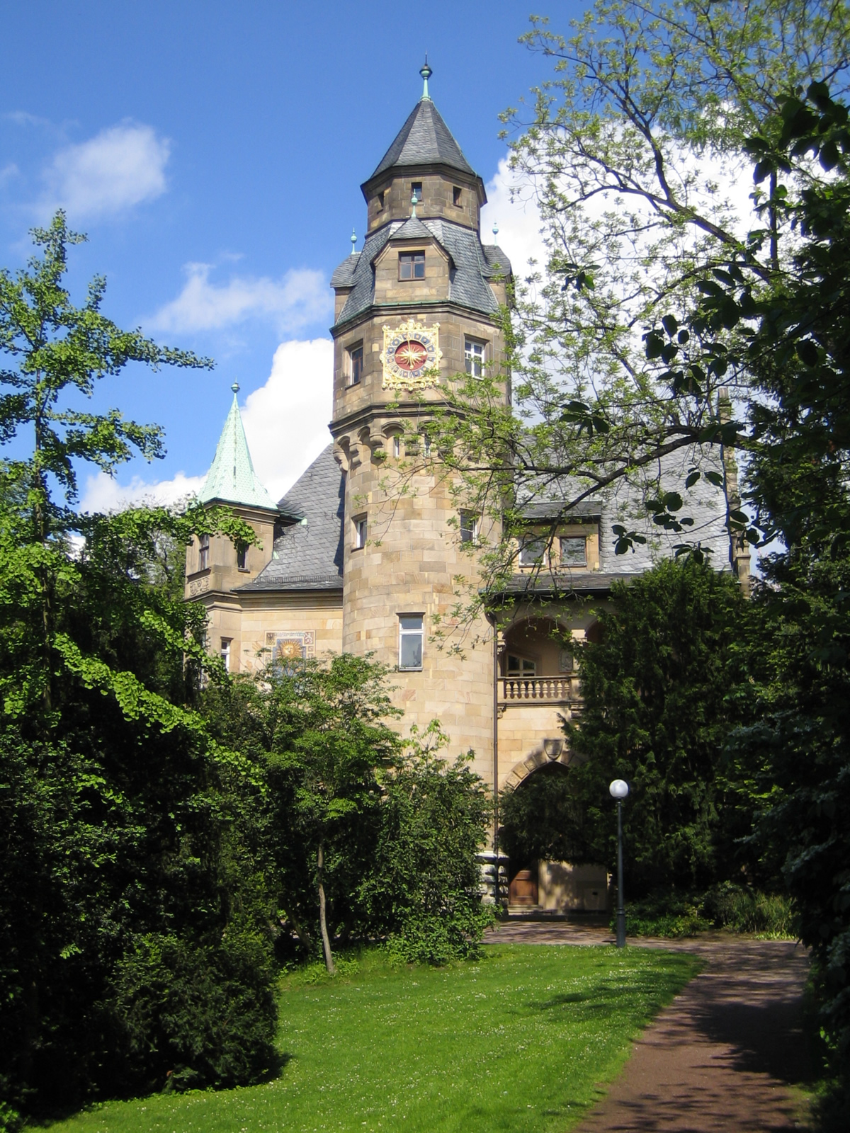 "Liebieghaus". Ursprünglich Villa des Barons von Liebieg, Architekt Leonhard Romeis, ab 1909 städtische Skulpturensammlung, heute "Museum Alter Plastik".